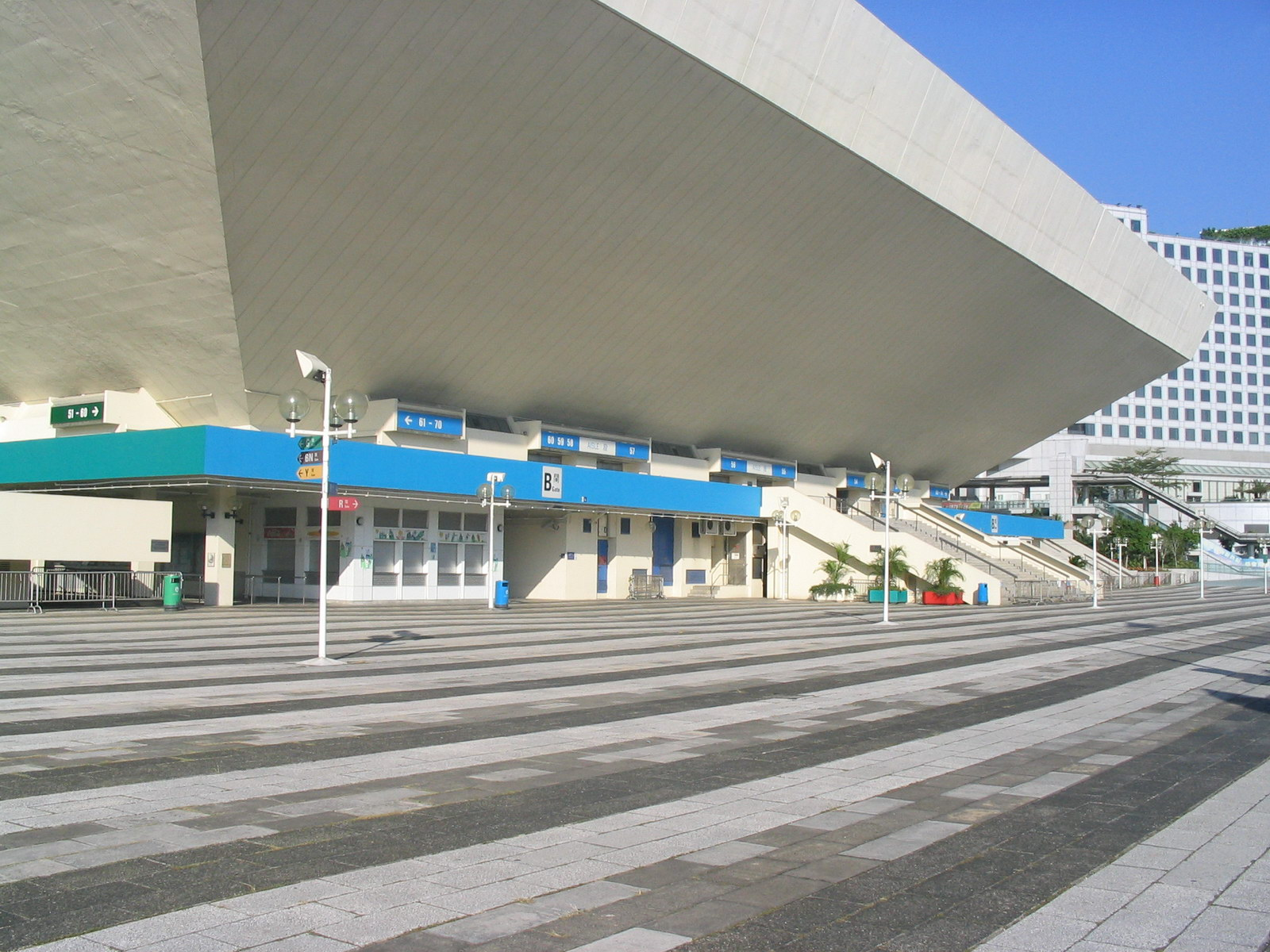 紅磡體育館/香港體育館 Hong Kong Coliseum